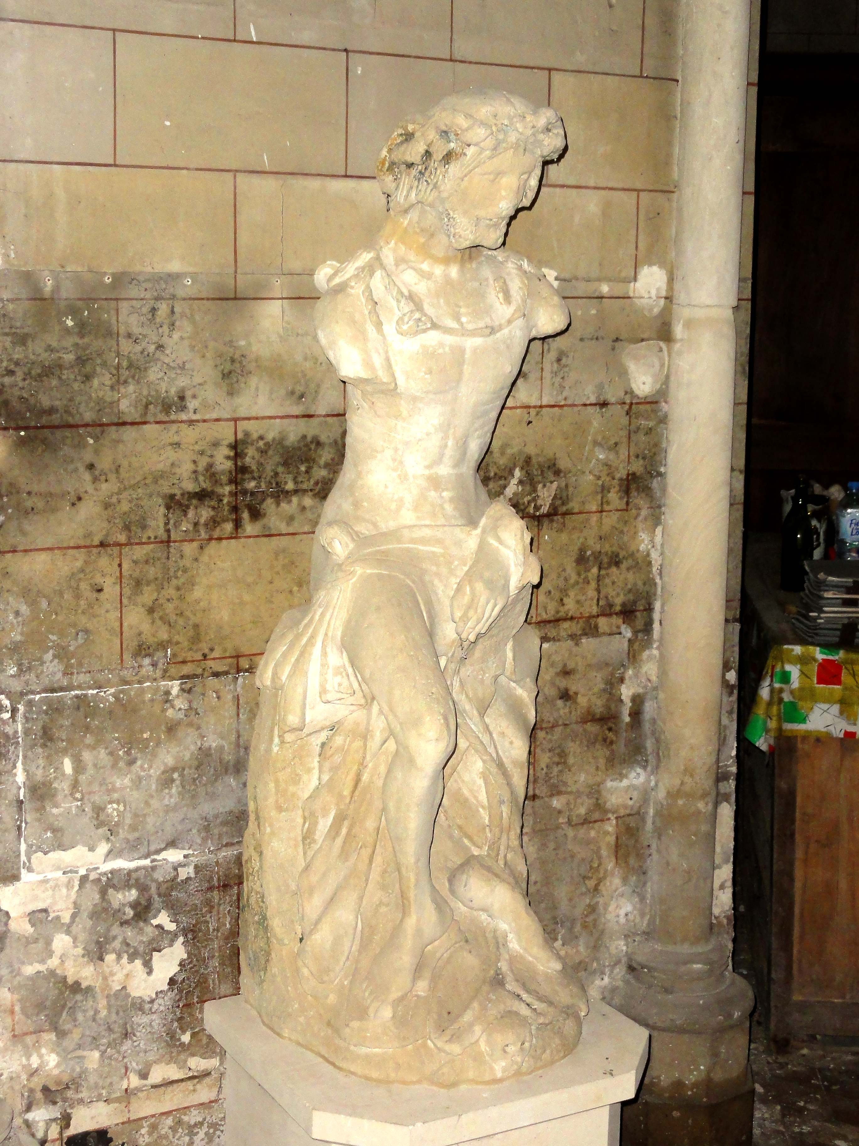 Christ aux liens.